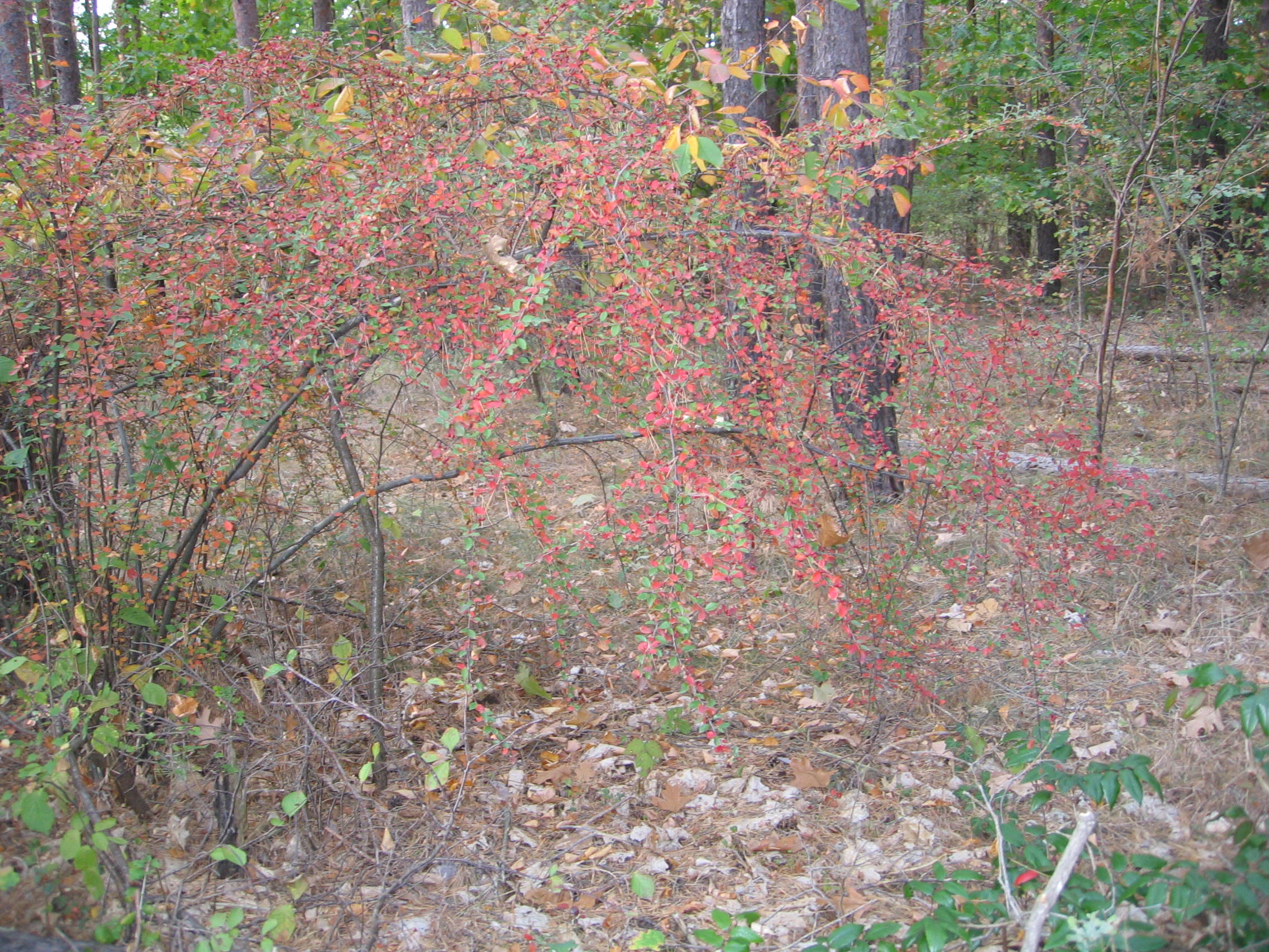 Ruhland, Grenzstraße, Wald gegenüber Hausnr. 2, Sparrige Zwergmispel, Busch mit Früchten, Herbst